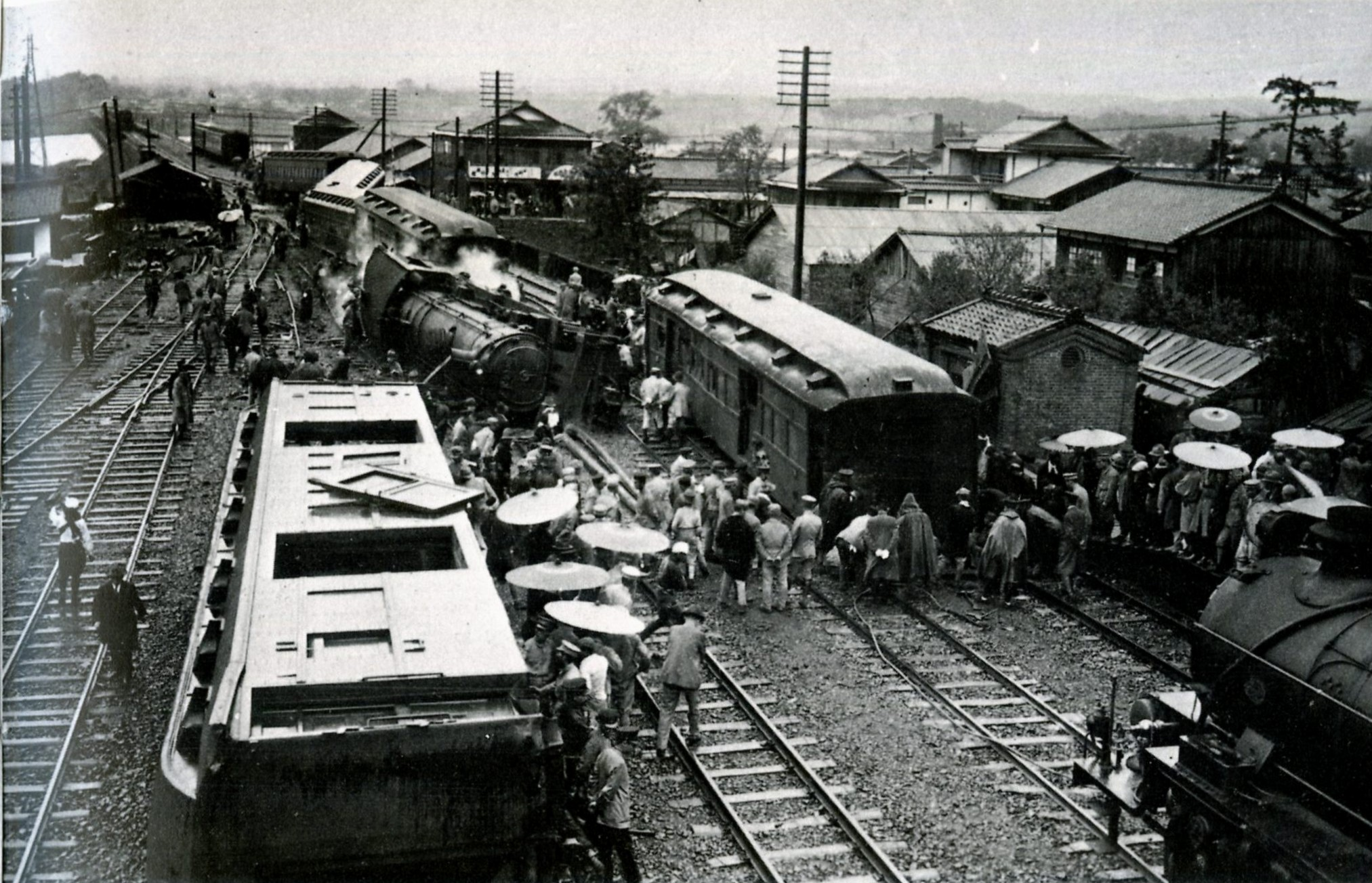 石山駅での脱線転覆事故